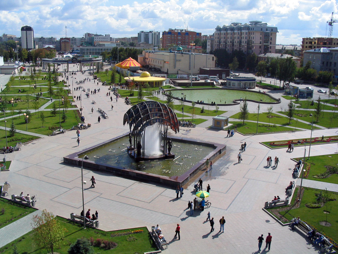 Fontano en la Kolora bulvardo. Tjumeno, Rusio